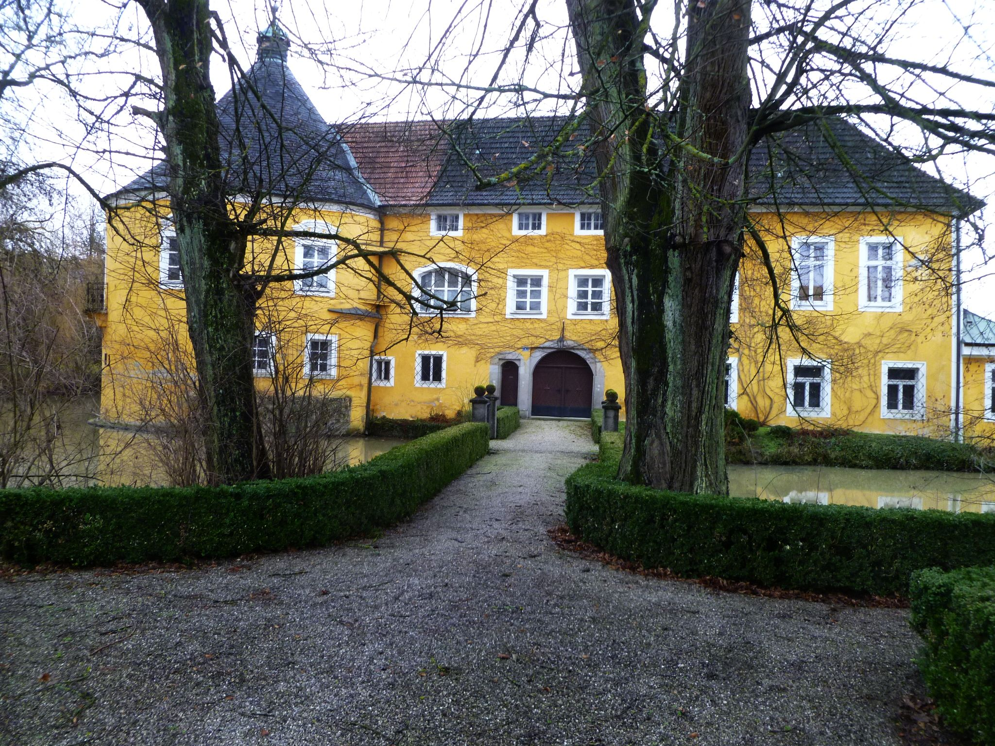 Schloss Gallspach mit Turm